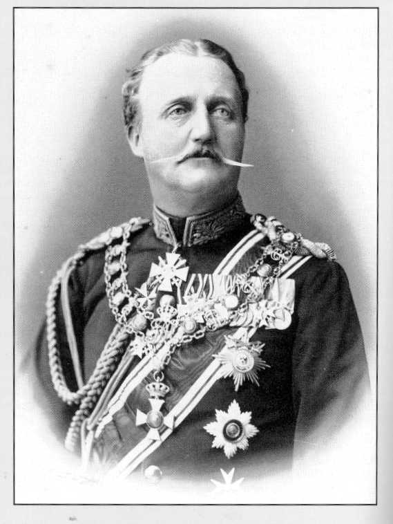 Georg, Prince of Schwarzburg-Rudolstadt (1838-1890)